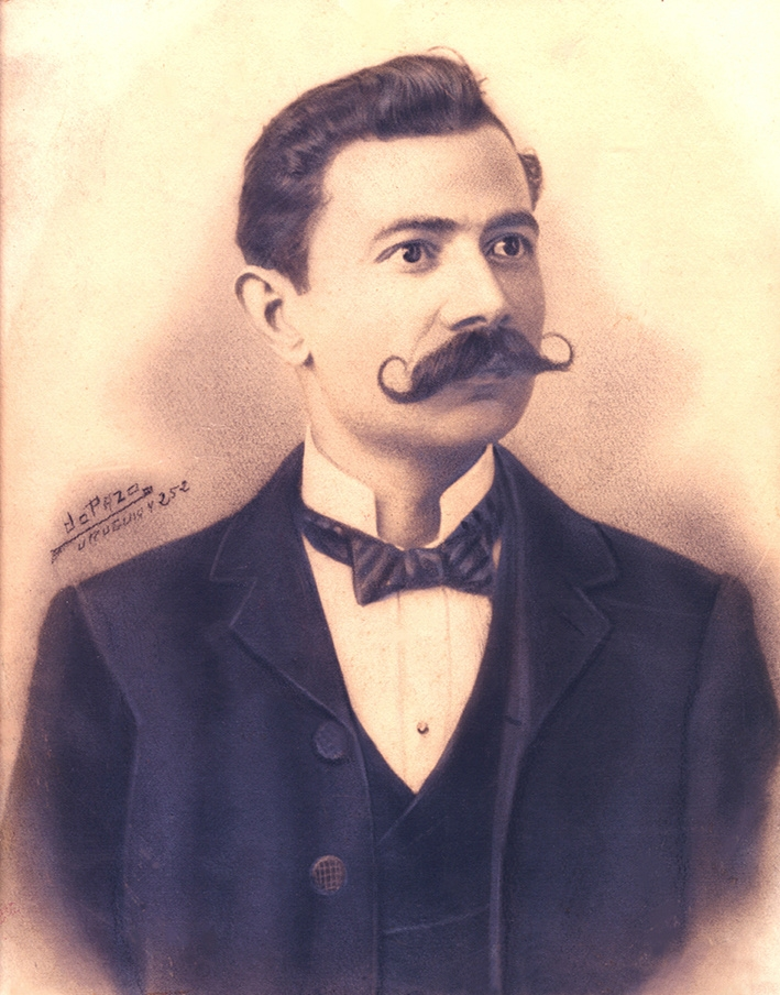 CARLOS FELIX ESCAYOLA MEDINA. Imagen cedida por el propio Gonzalo Vázquez Gabor para su uso sin reservas en Wikipedia (GNU Free Documentation License GFDL; trámite ya realizado frente a "permissions-commons" con fecha jueves 12 septiembre 2013; OTRS ticket número 2013082910000086) ([ {2013082910000086 } Verificar ticket en OTRS]).